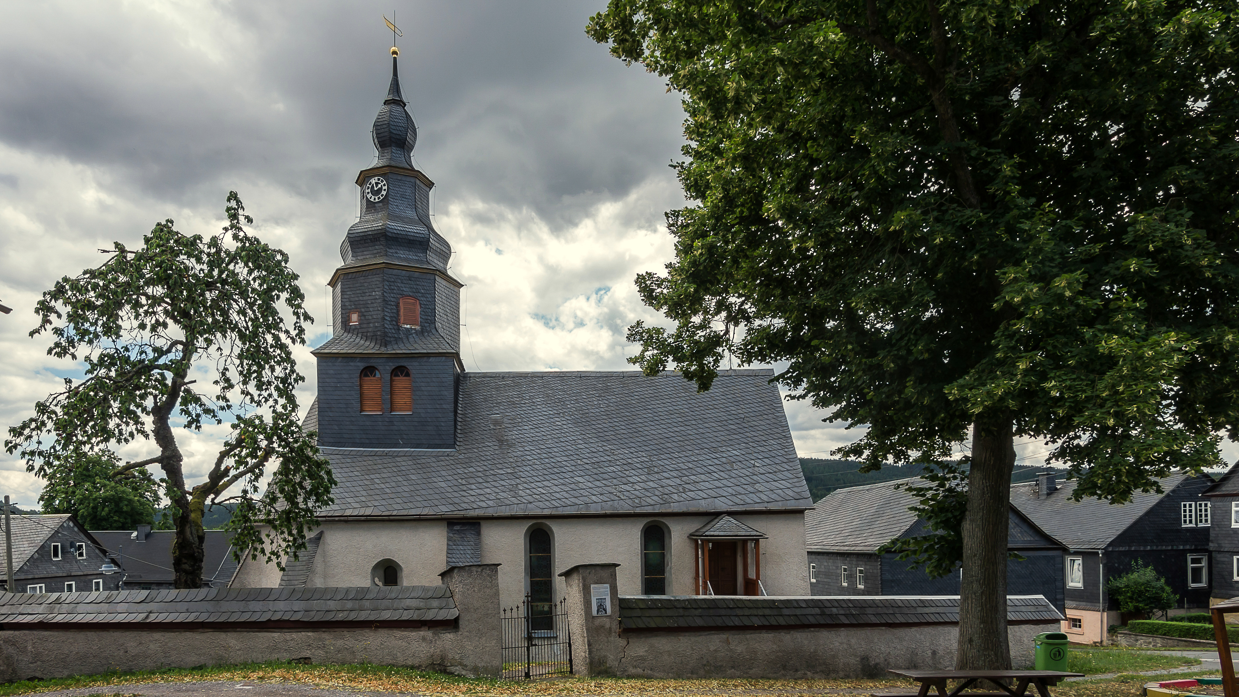 Schmiedebach Nr. 1 Kirche mit Ausstattung, Kirchhof mit Einfriedung